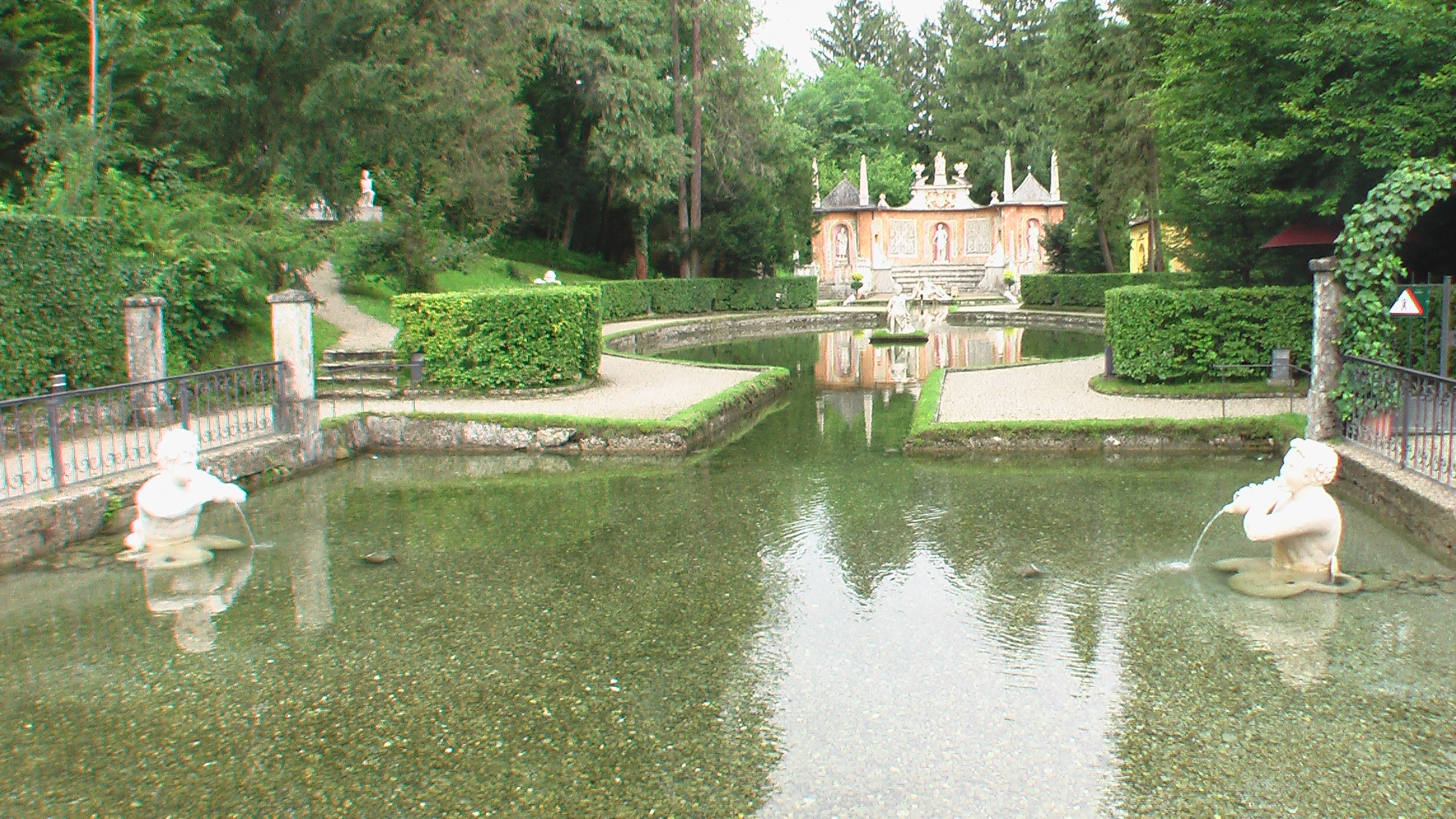 Schloss Hellbrunn Wasserspiele